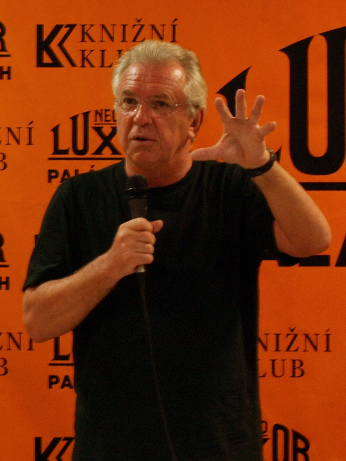 Jaromír Hanzlík během autogramiády v Neoluxoru, 2009